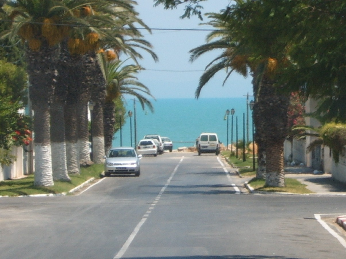 rue de Carthage